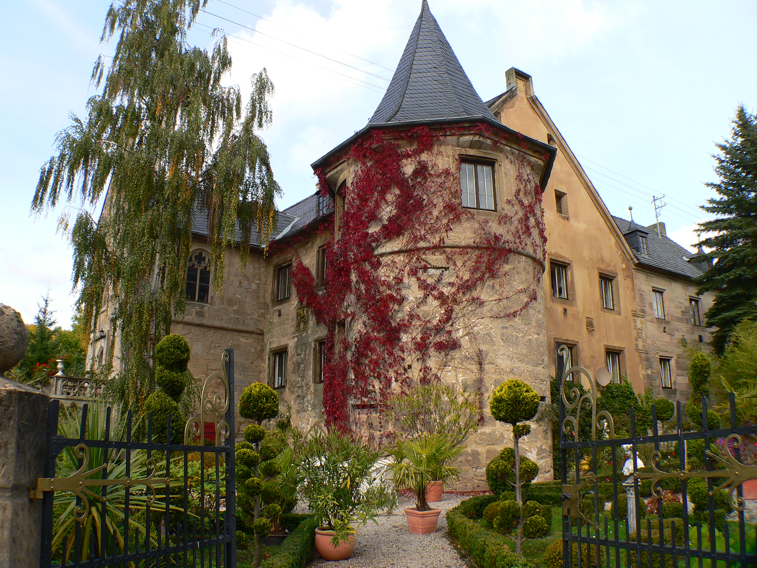 Schloss in Küps-Schmölz, Bayern, Regierungsbezirk Oberfranken, Landkreis Kronach - Eckturm